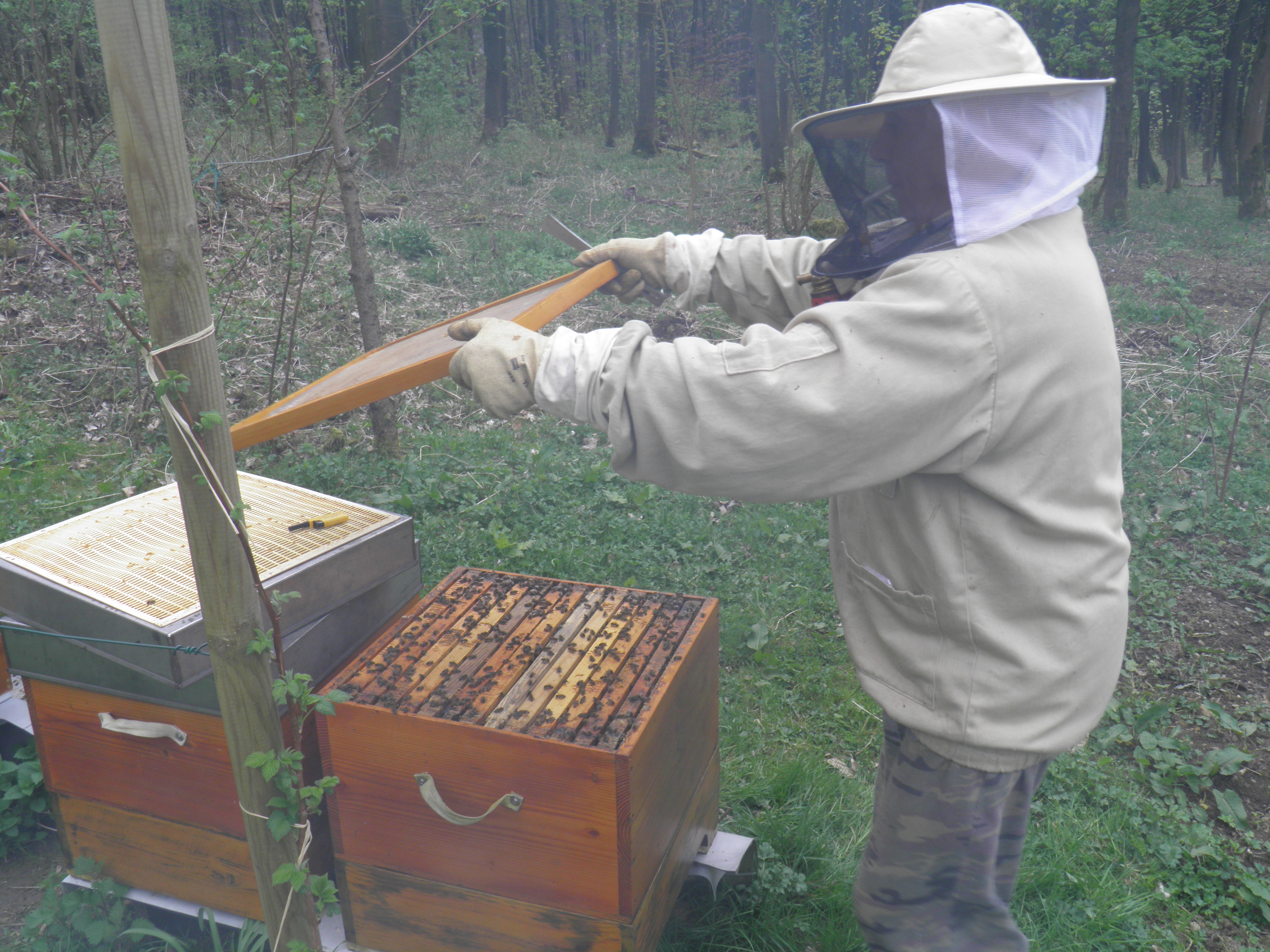 Imker, der mit starkem Smoker-Einsatz unter intensiver Qualmentwicklung die Wabenrähmchen einer Magazinbeute untersucht